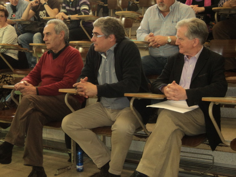 Camilo Nogueira, Carlos Aymerich e Suso Veiga na Asemblea nacional e congreso constituínte de Máis Galiza.